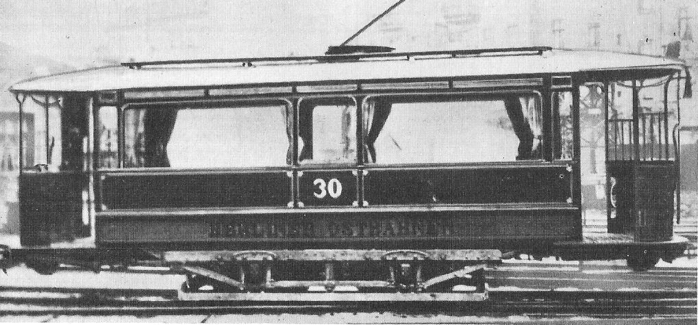 Triebwagen 30 der Berliner Ostbahnen vor der Umnummerierung 1912